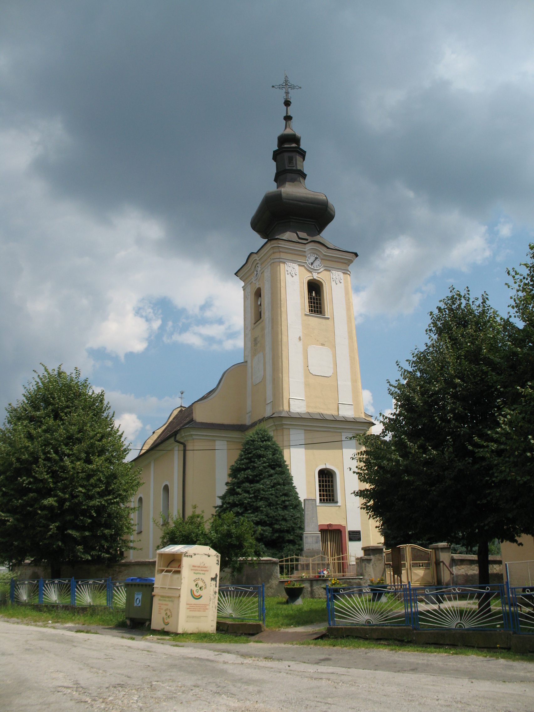 Gócs faluSlovenčina: Evanjelický kostol v Gočove